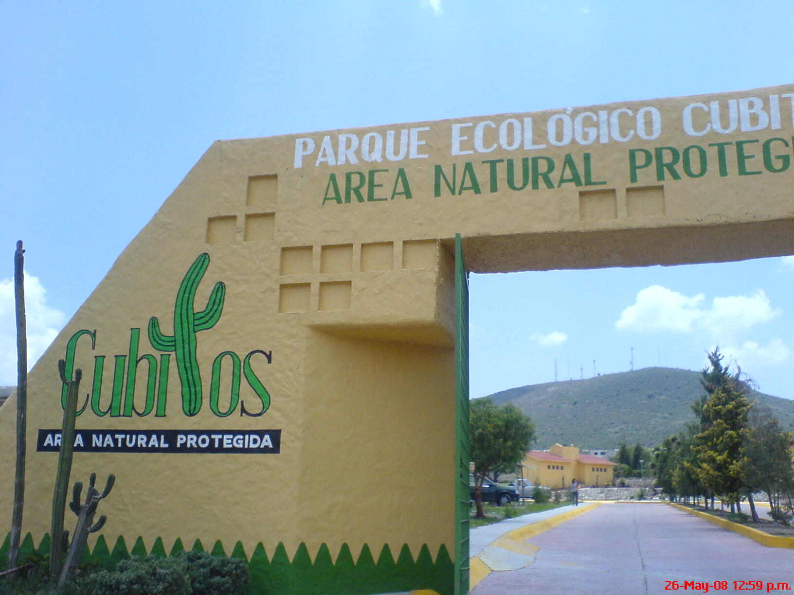 Entra al parque ecologico estatal de cubitos en la ciudad de pachuca en el estado de hidalgo, mexico